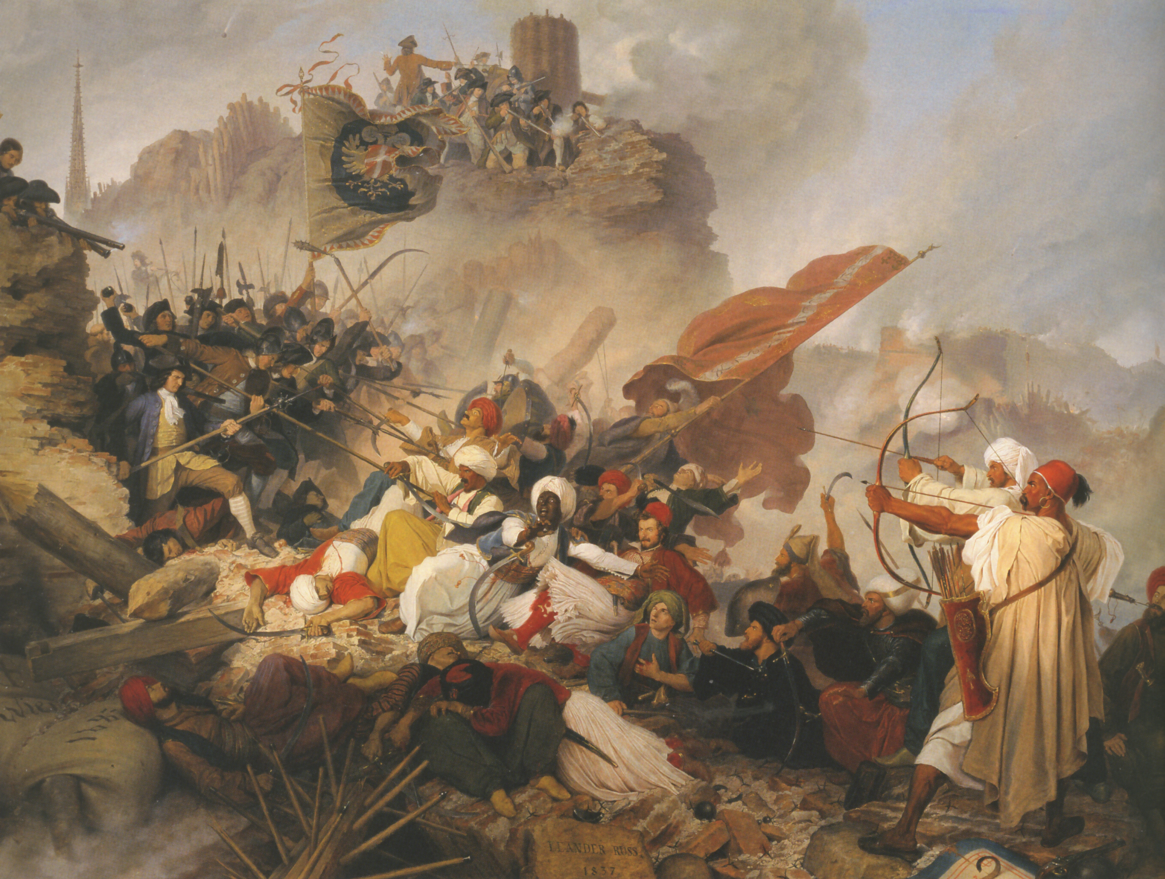 Sturm der Türken auf die Löwelbastei 1683title QS:P1476,de:"Sturm der Türken auf die Löwelbastei 1683" label QS:Lde,"Sturm der Türken auf die Löwelbastei 1683"